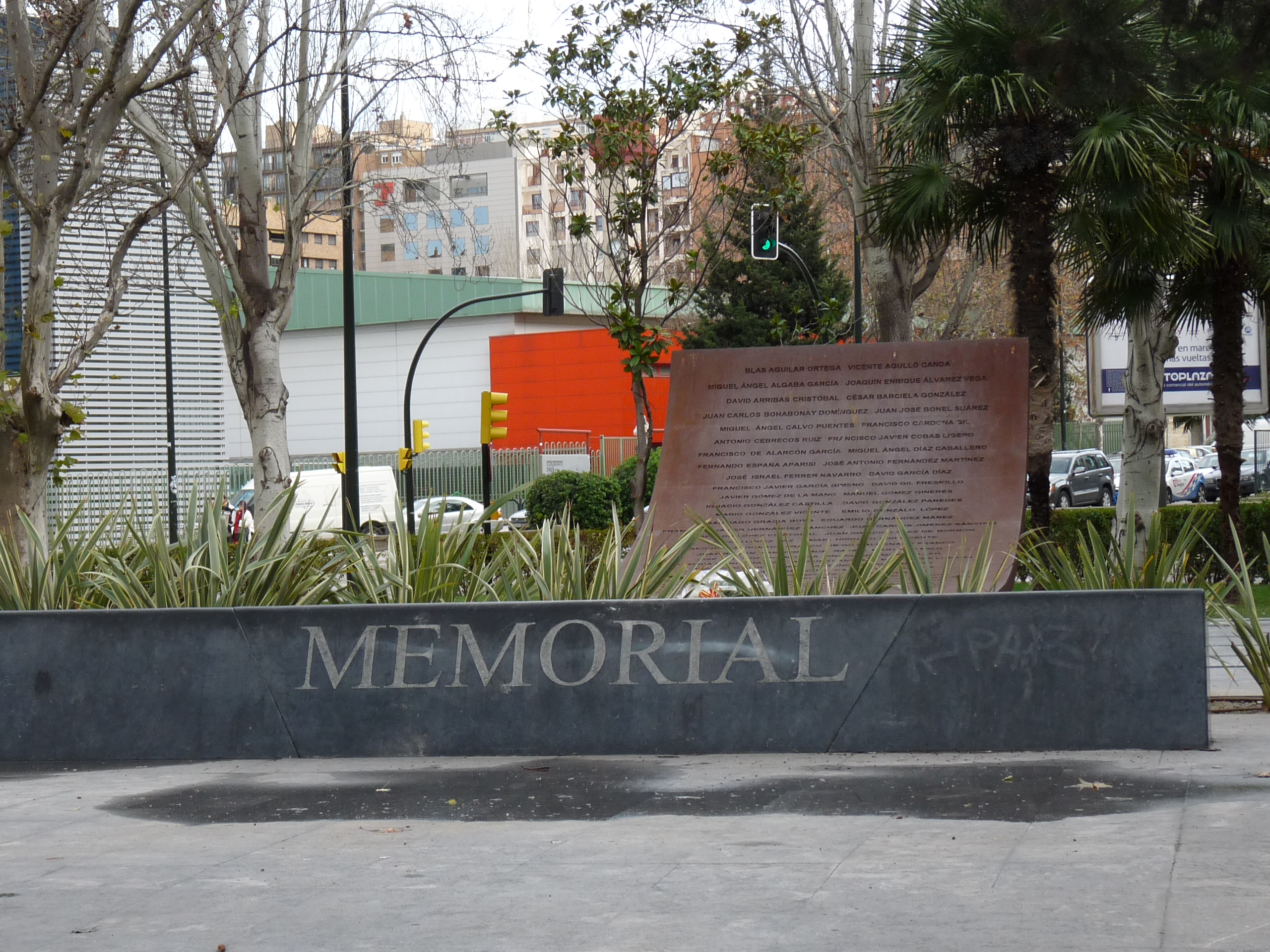 Zaragoza - Monumento a las víctimas del Yak 42 (17 de abril de 2007) - Autor: José Manuel Pérez Latorre [1]